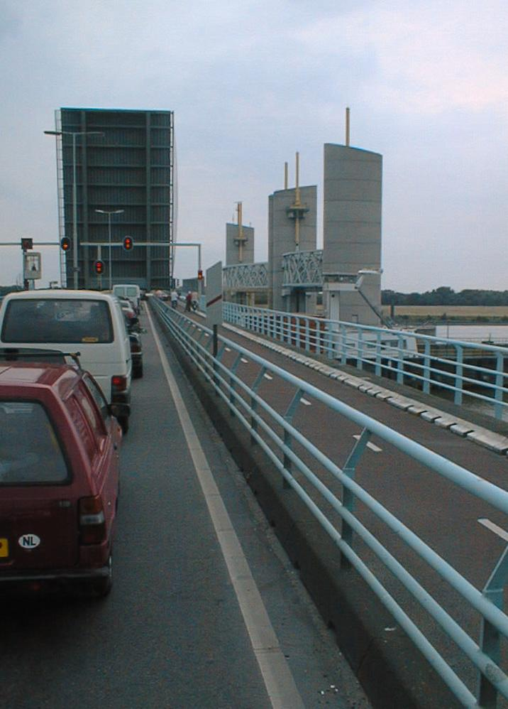 Hartelbrug in open toestand